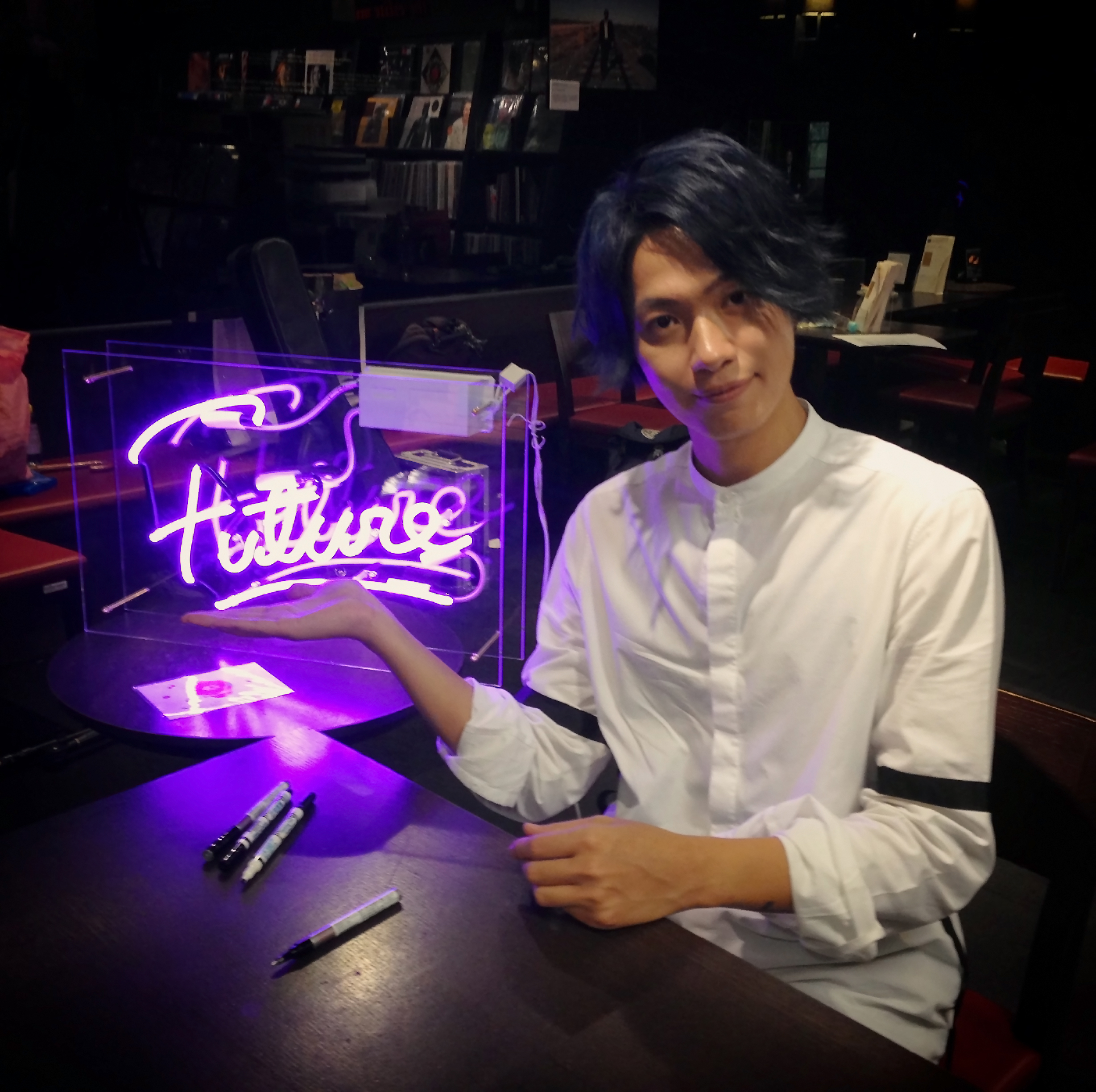 黃少谷《未來》專輯簽唱會